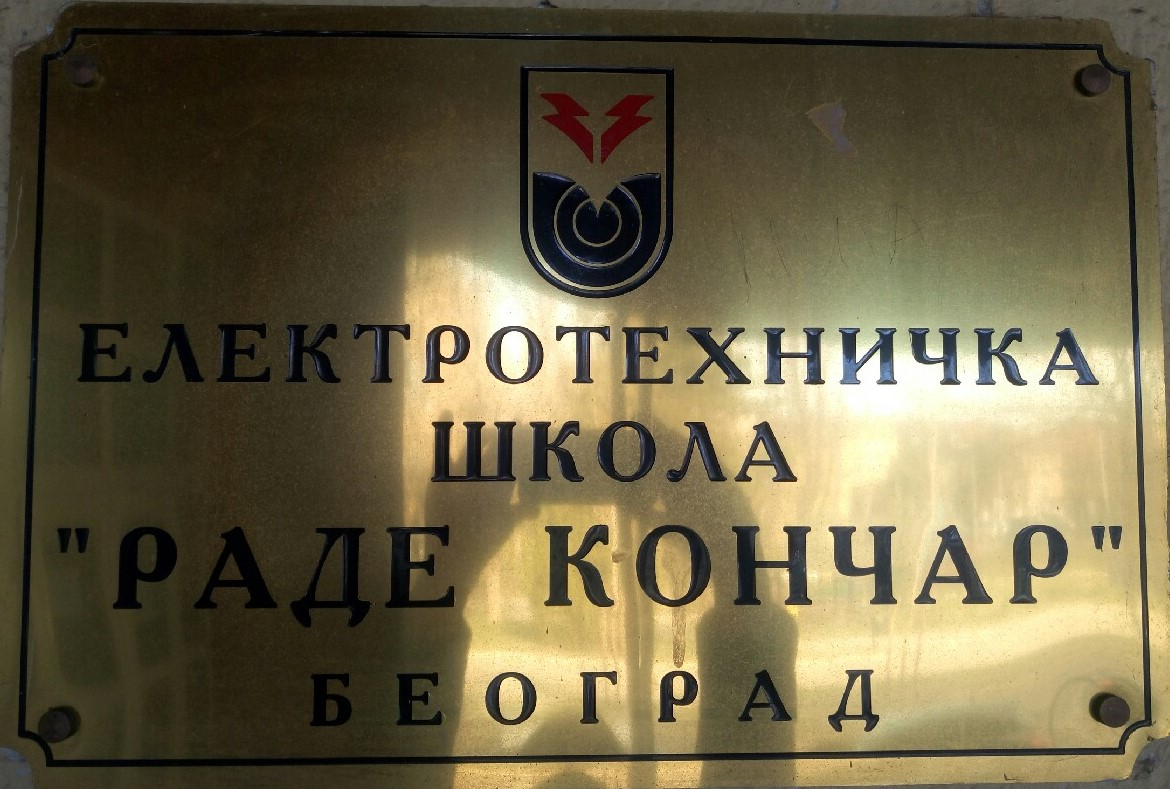 Српски (ћирилица): Табла на улазу школе